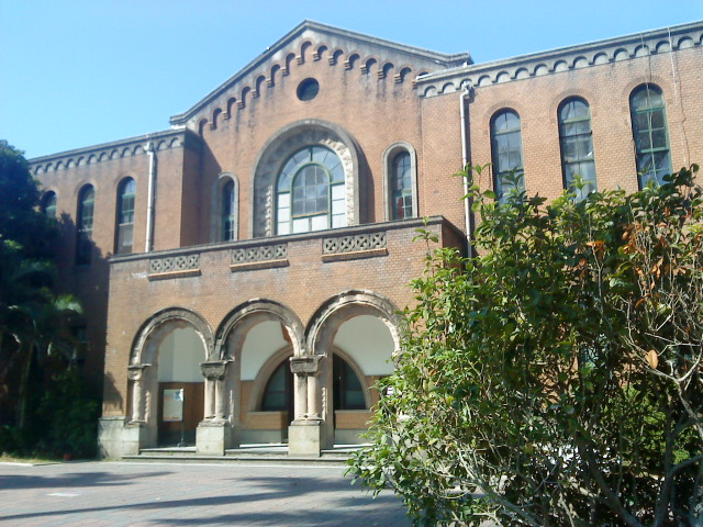 中文（台灣）: 台大校史館。